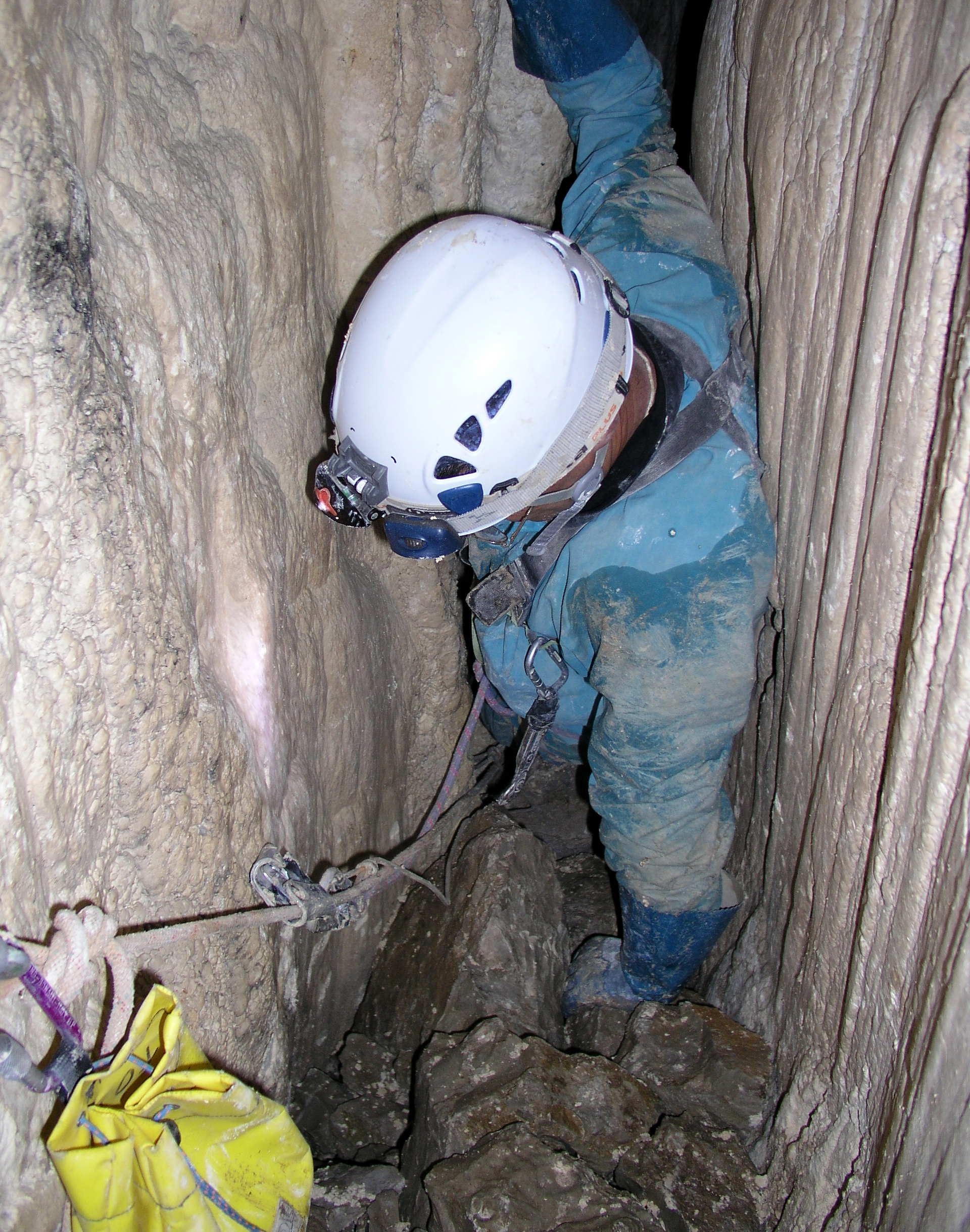 Gouffre du Pied du Mulet (Eourres).